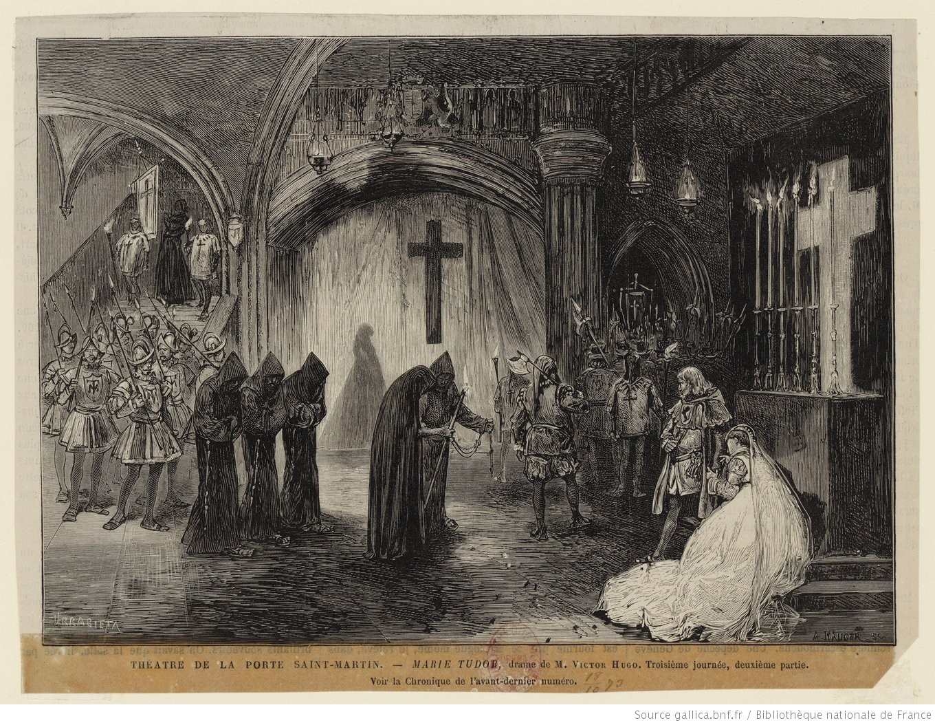 Théâtre de la Porte Saint-Martin. Marie Tudor, drame de M. Victor Hugo Date d'édition : 1873 Source : Gallica